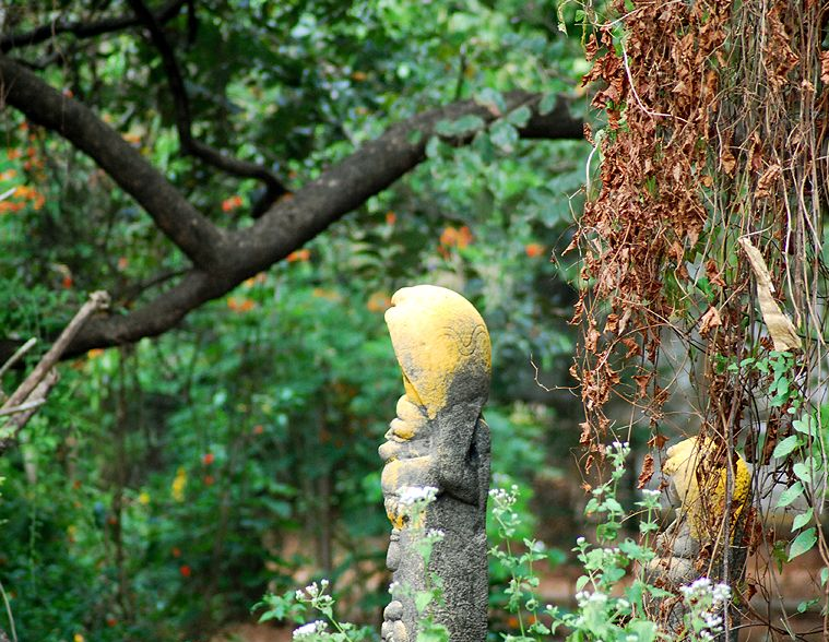 Sarpa Kavu at Sakthanthamburan palace, Thrissur, Kerala, India.